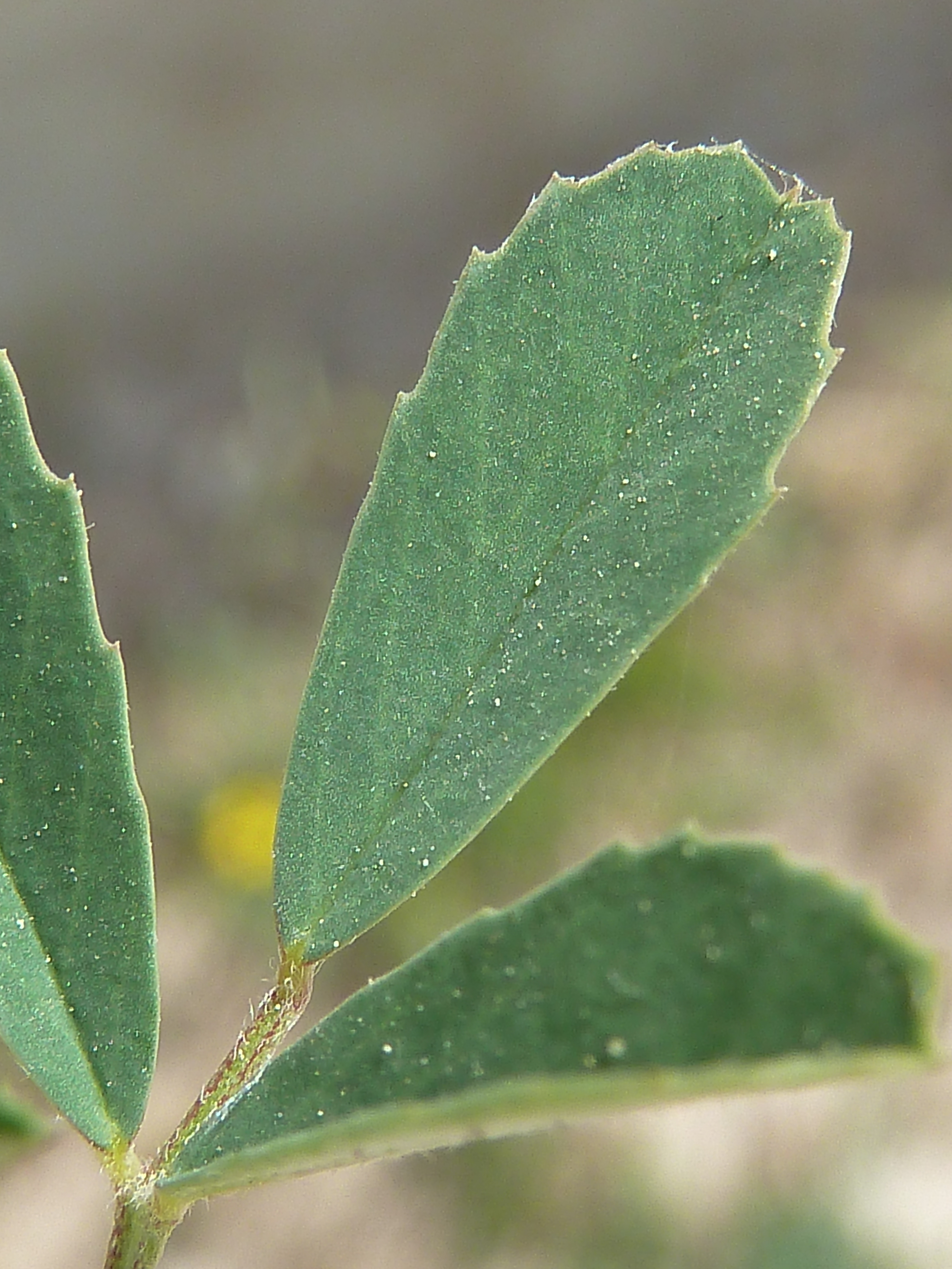 Melilotus sulcatus (Corona de olor, trébol caballar, trébol real, ...) - Hoja trifoliada, haz; detalle del folíolo apical. - La Huerta, Albatera (Provincia de Alicante, España).